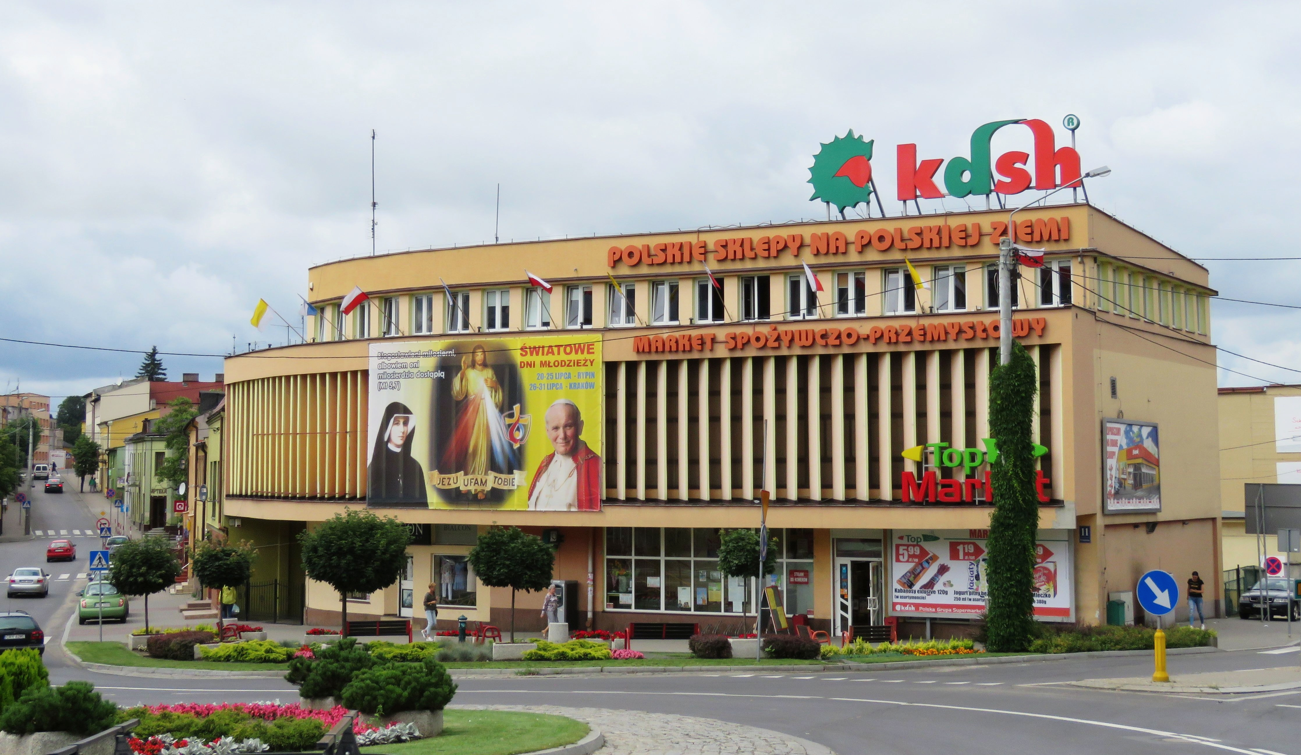 KDSH w Rypinie